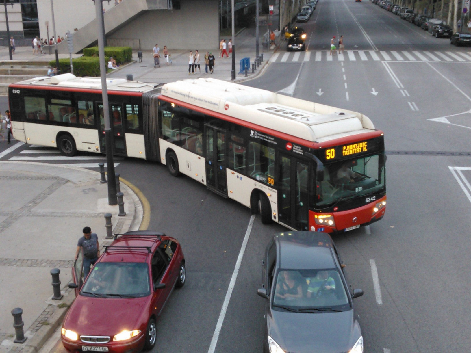 Autobús de la línia 50 a Av. Maria Cristina